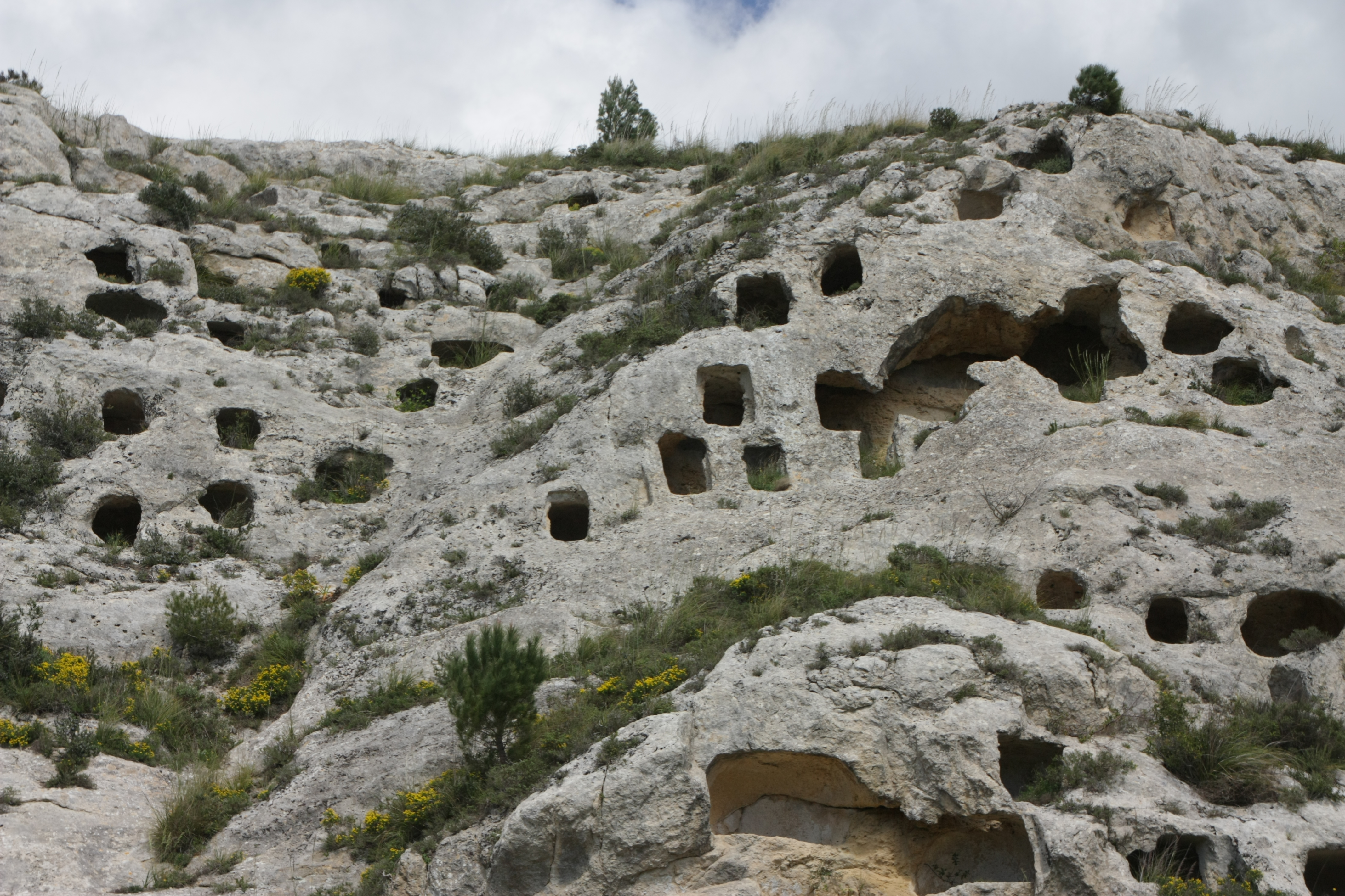 Necropoli di Realmese